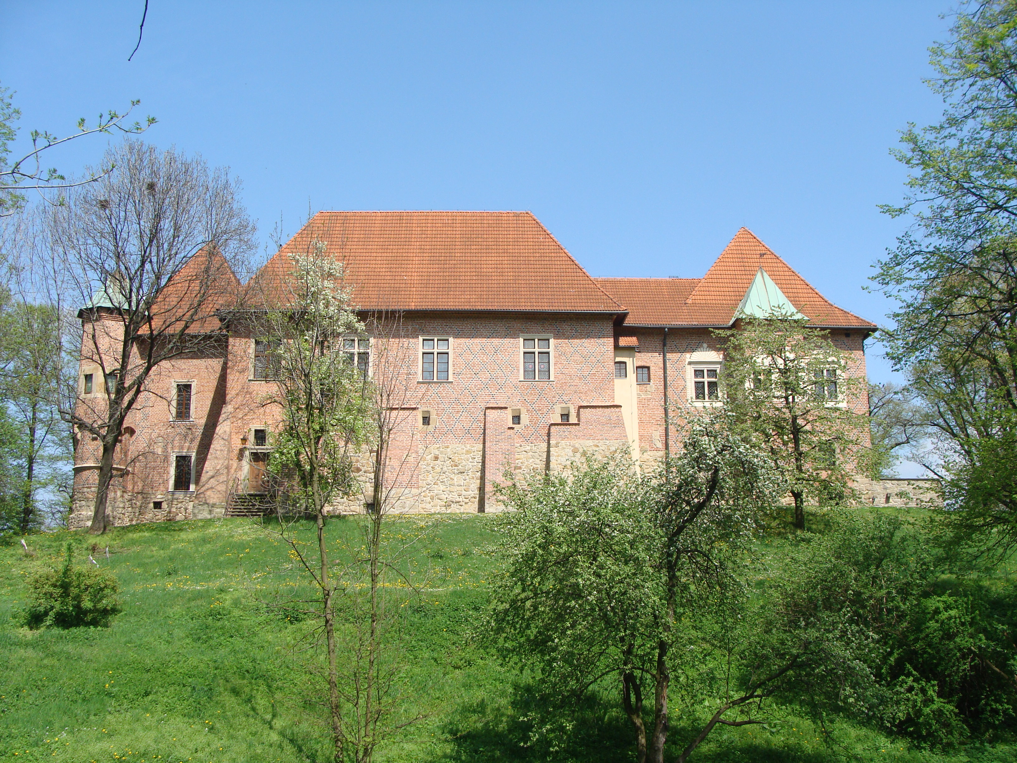 Zamek w Dębnie